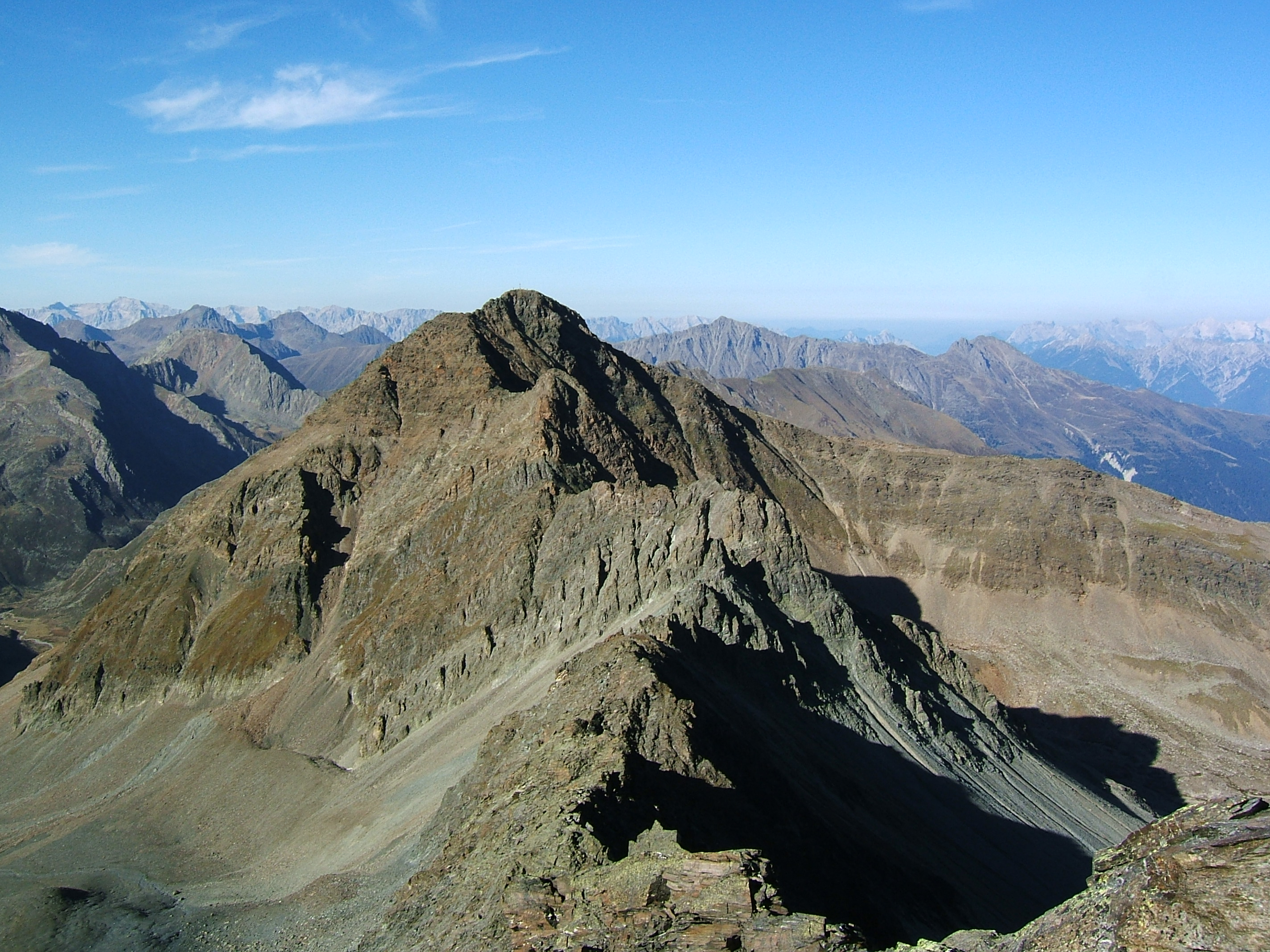 Zischgelesspitze von Süden, von der Schöntalspitze